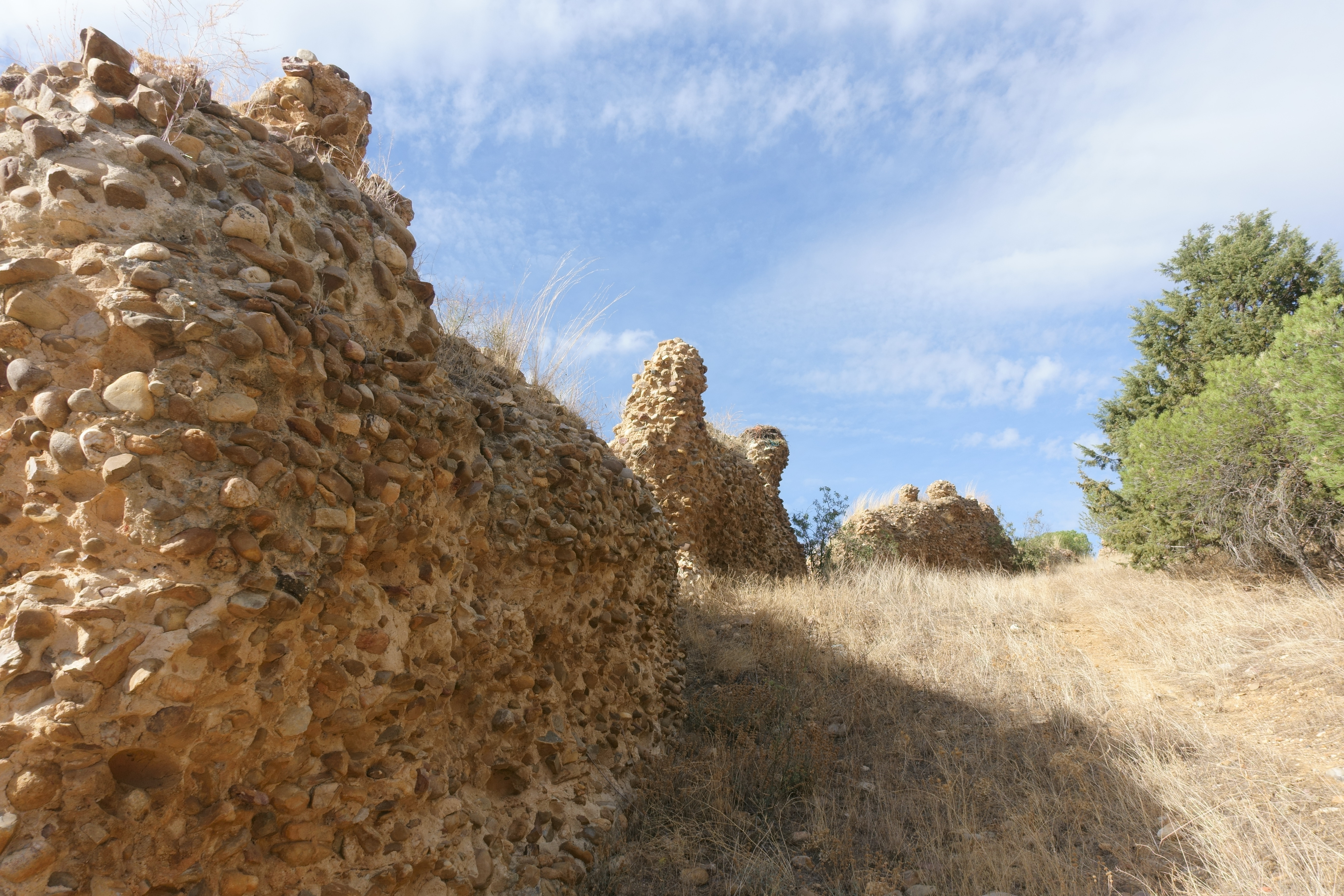 Muralla medieval en Belver de los Montes (Zamora, España).